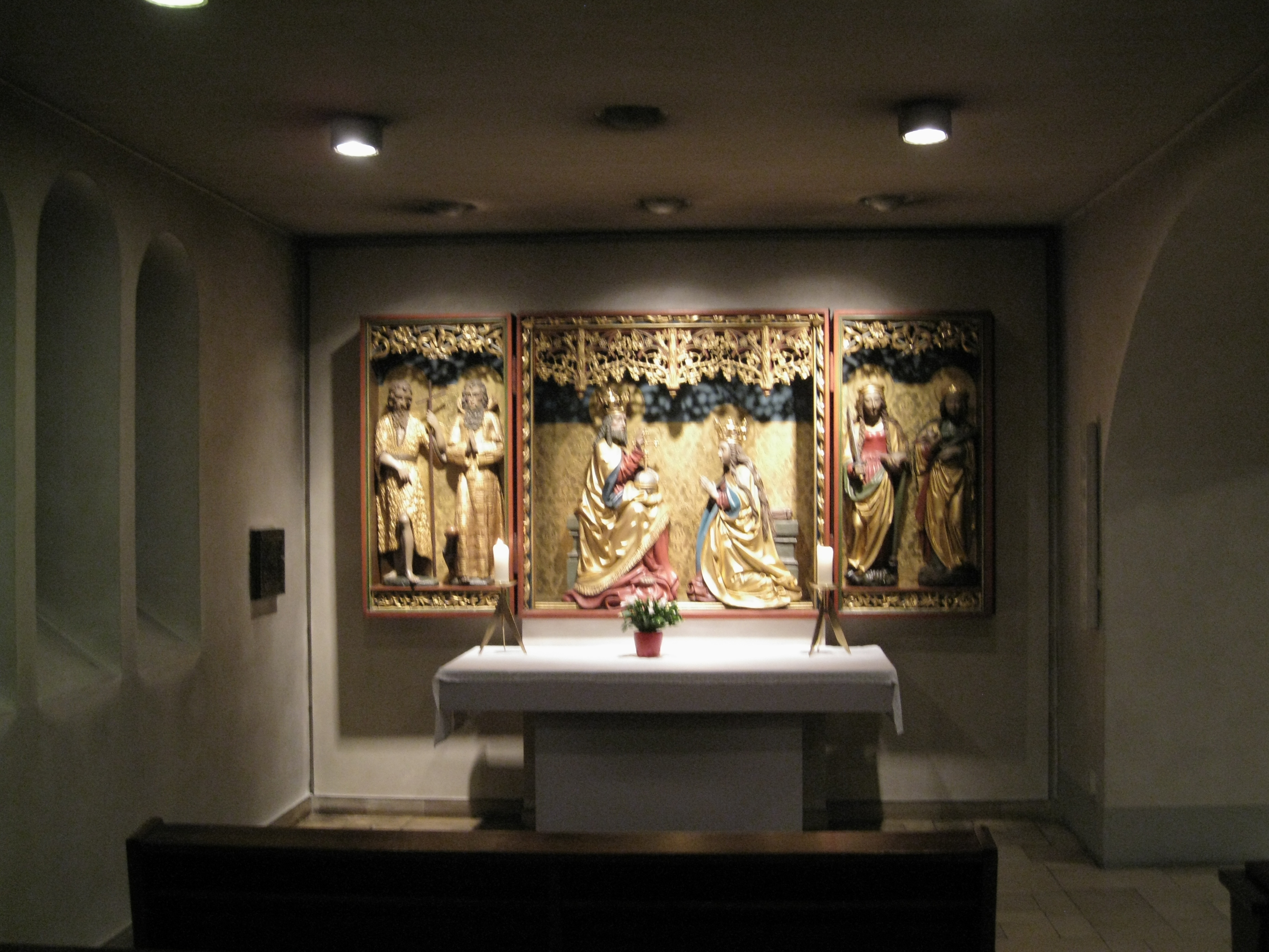 Marienaltar an der Stirnwand des Seitenschiffes